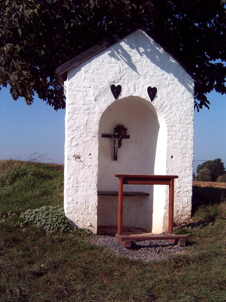 Limburgs: De Wiete kapel bie Sjoppem foto: Els Diederen 2004 Aelske